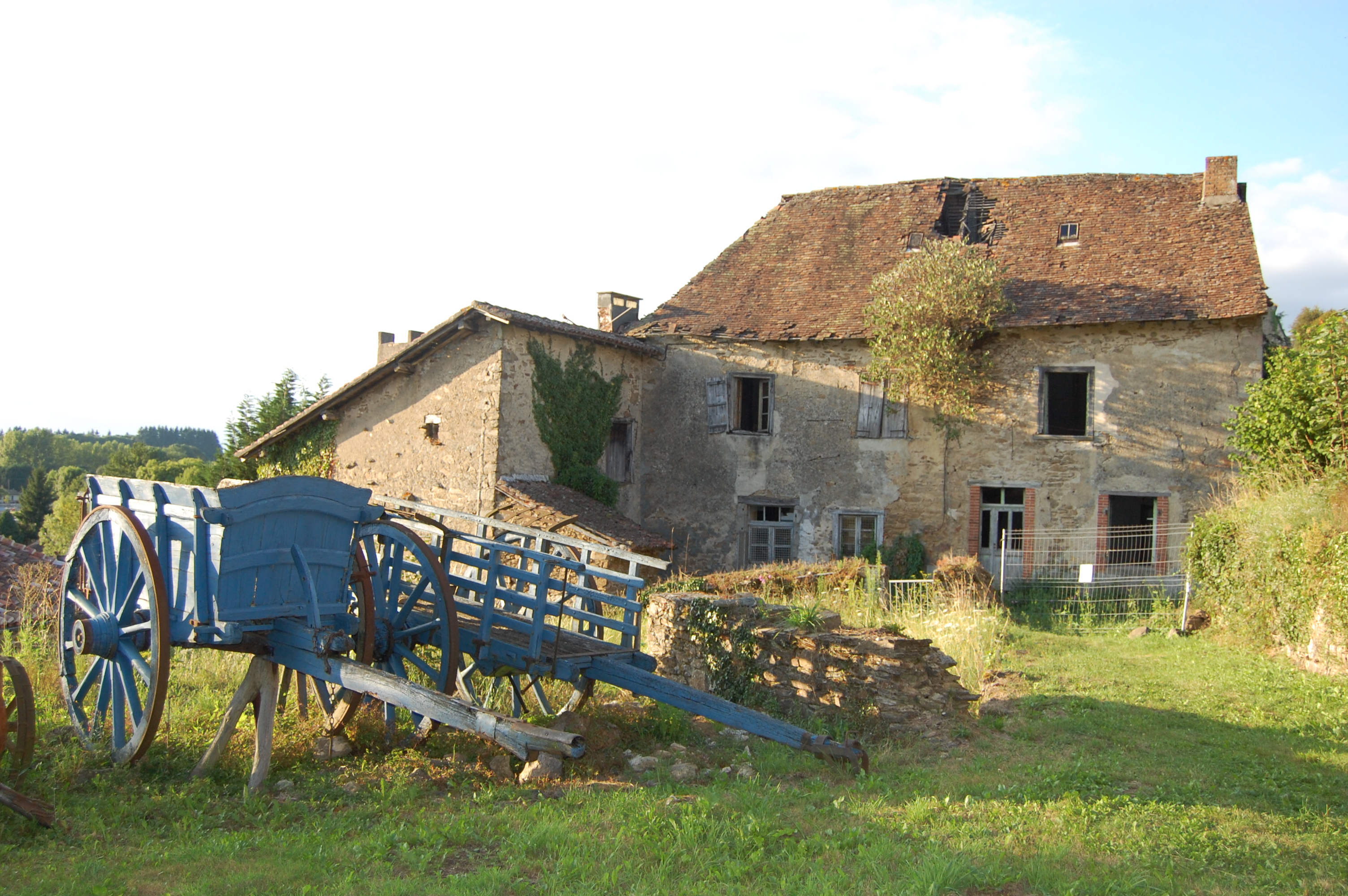 Deux veilles charrettes (charretou) entreposées dans le fort de Châlus Chabrol